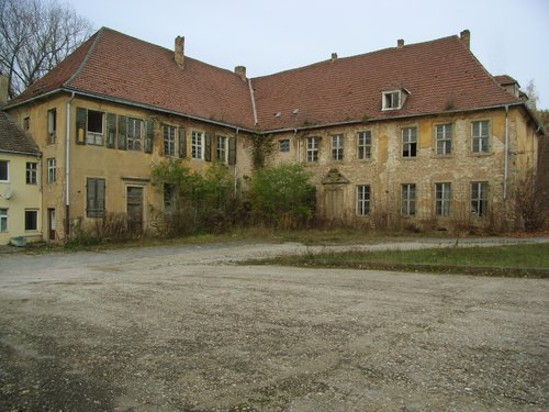 Hofansicht der Würdenburg heute